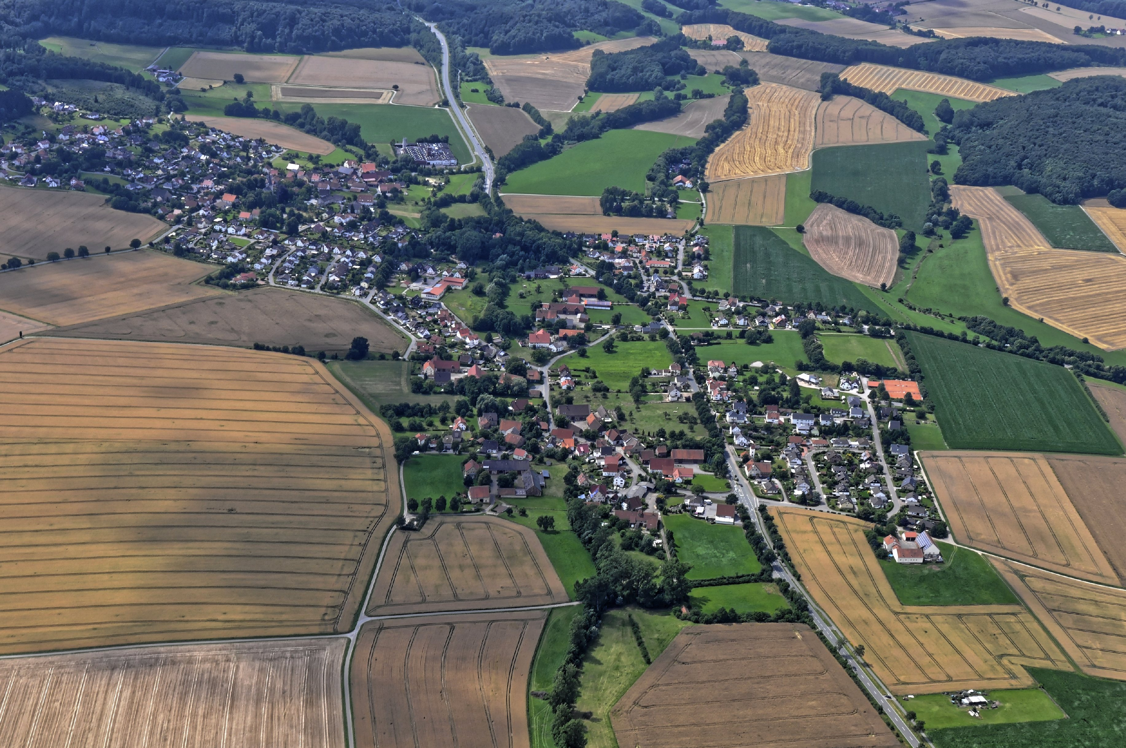 Bilder vom Flug Nordholz-Hammelburg 2015: Herrentrup (vorn), Reelkirchen (links hinten).